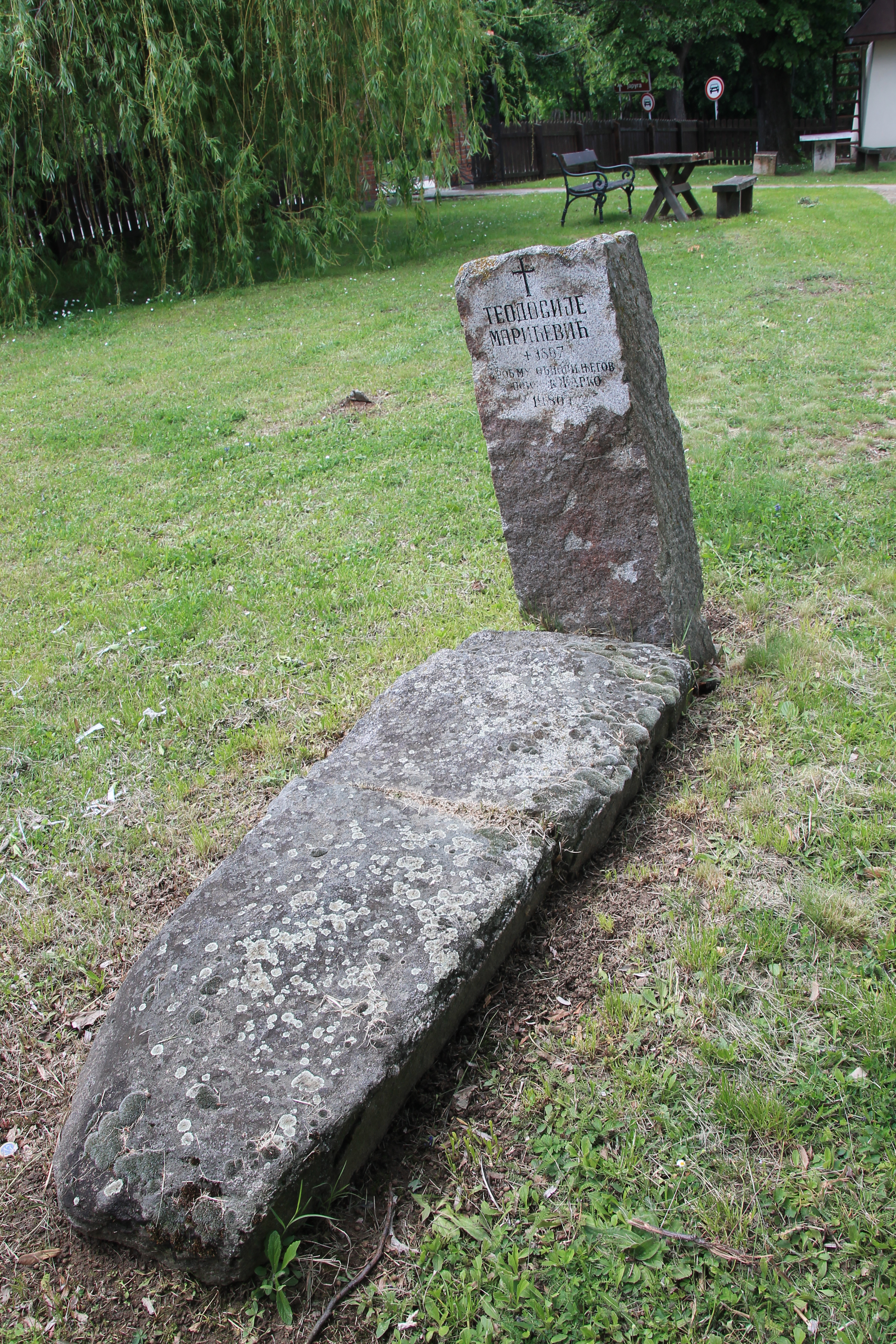 Znamenito mesto Orašac